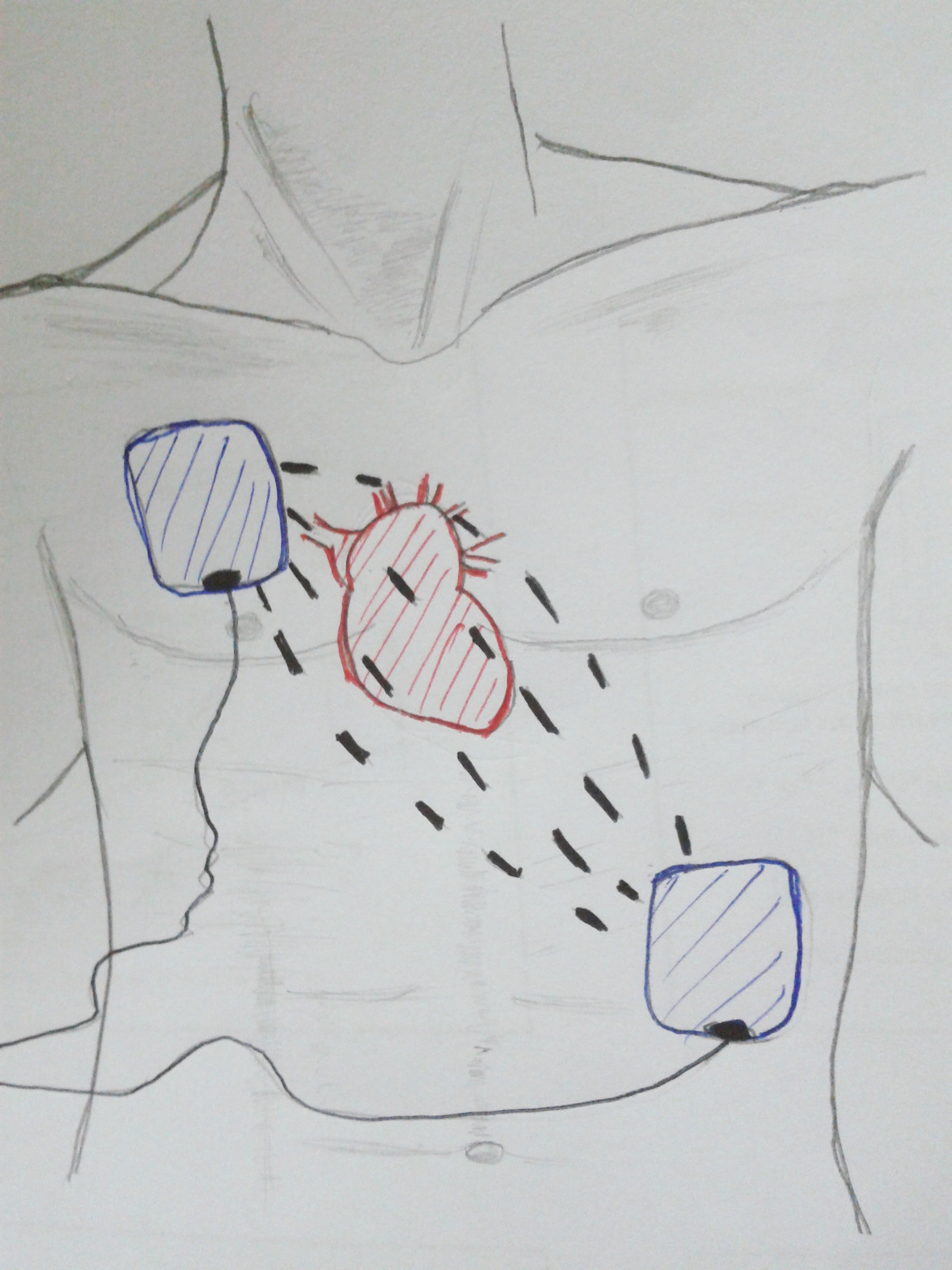 Penempatan Defibrilator yang berdekatan dengan jantung